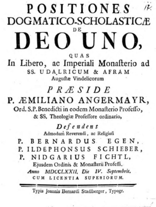 Pater Aemilian Angermayr, "Positiones" Titelblatt 1772 Augsburg